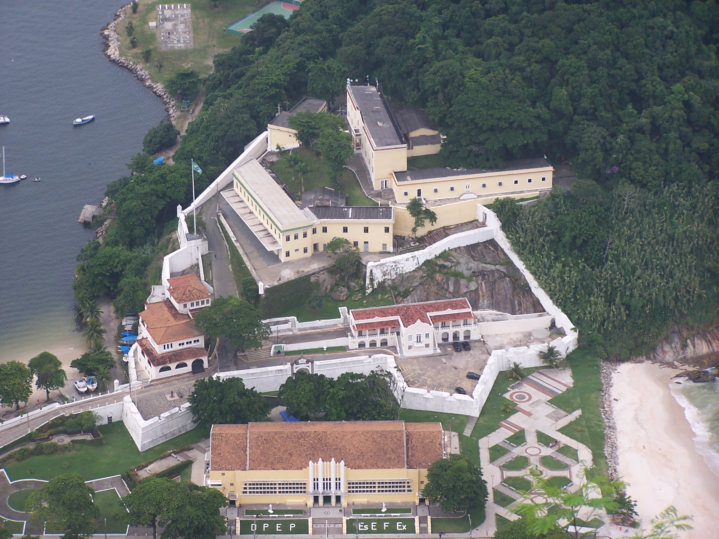 Sao Joao Fort in Rio de Janeiro